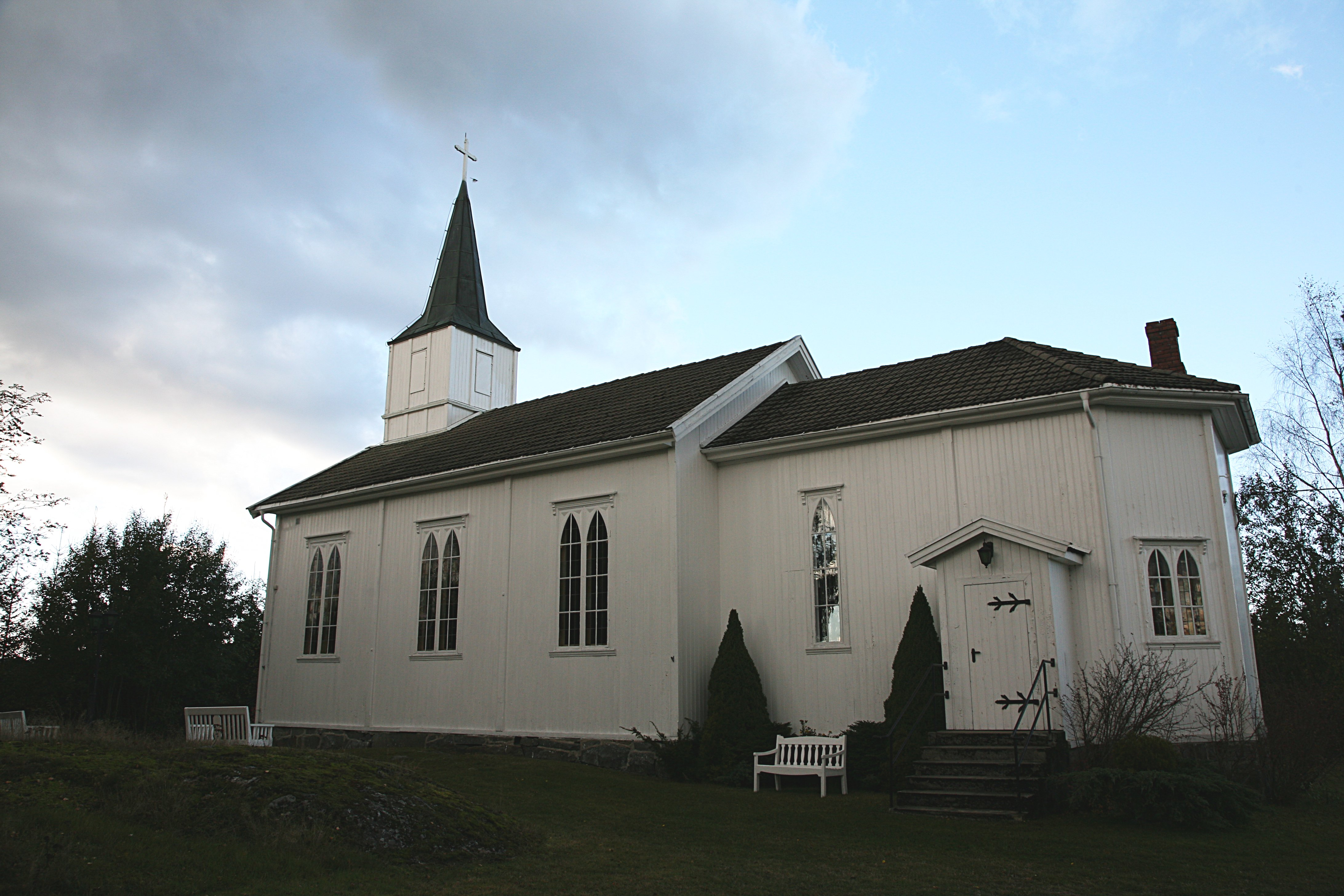 Klund church in Marker, Østfold, Norway